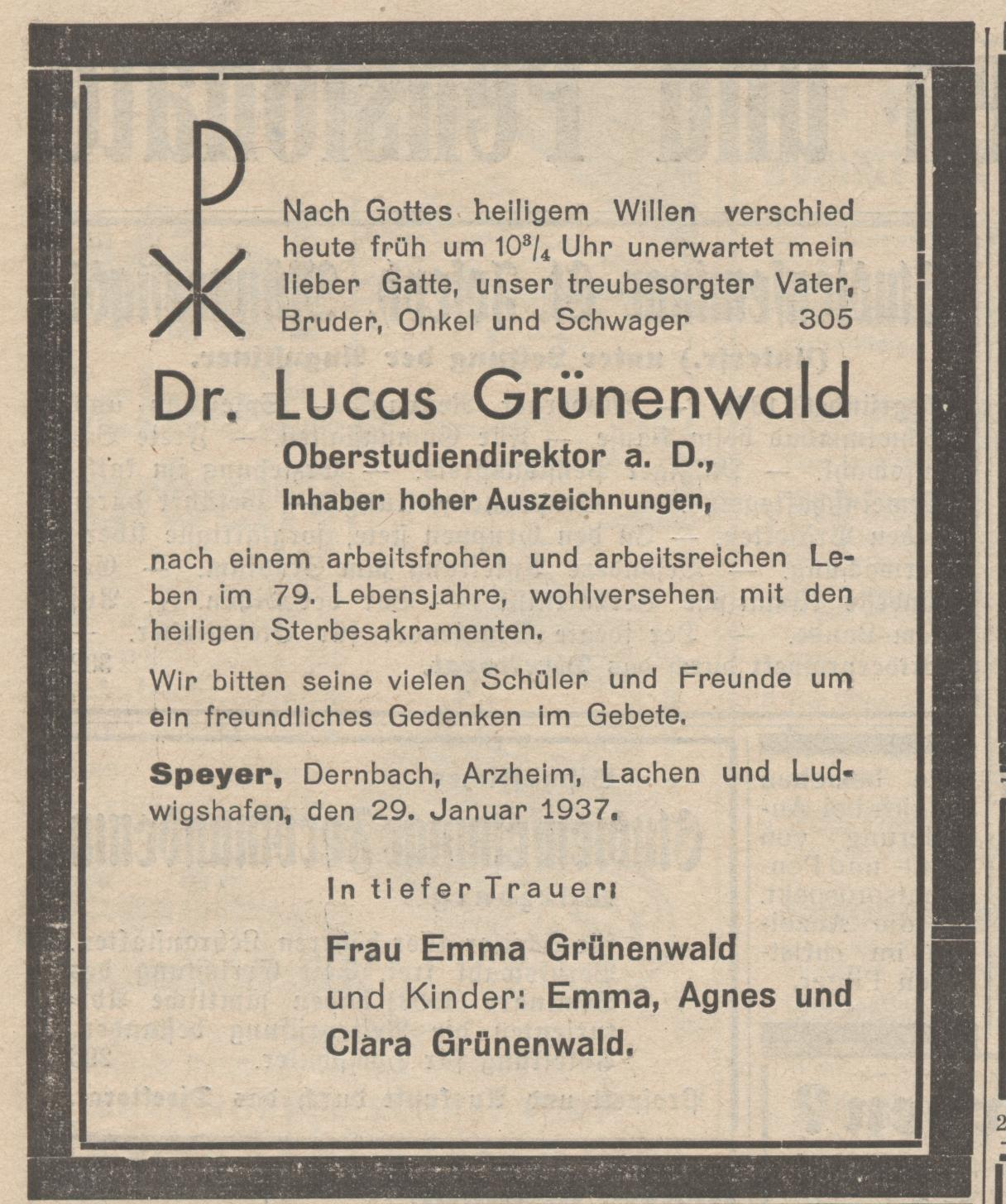 Lukas Grünenwald Speyer, Historiker, Todesanzeige